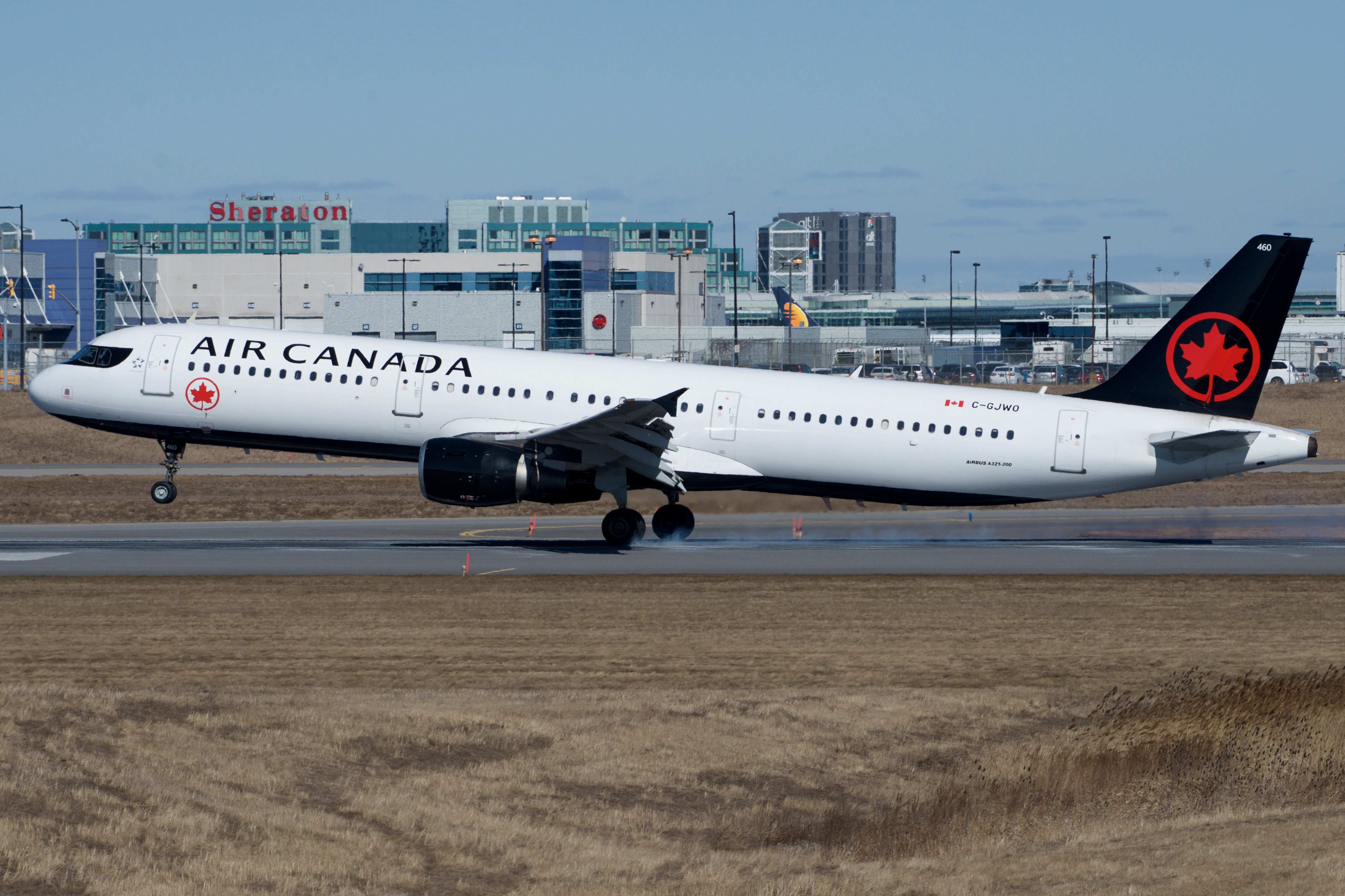 Air Canada Airbus A321 C-GJWO